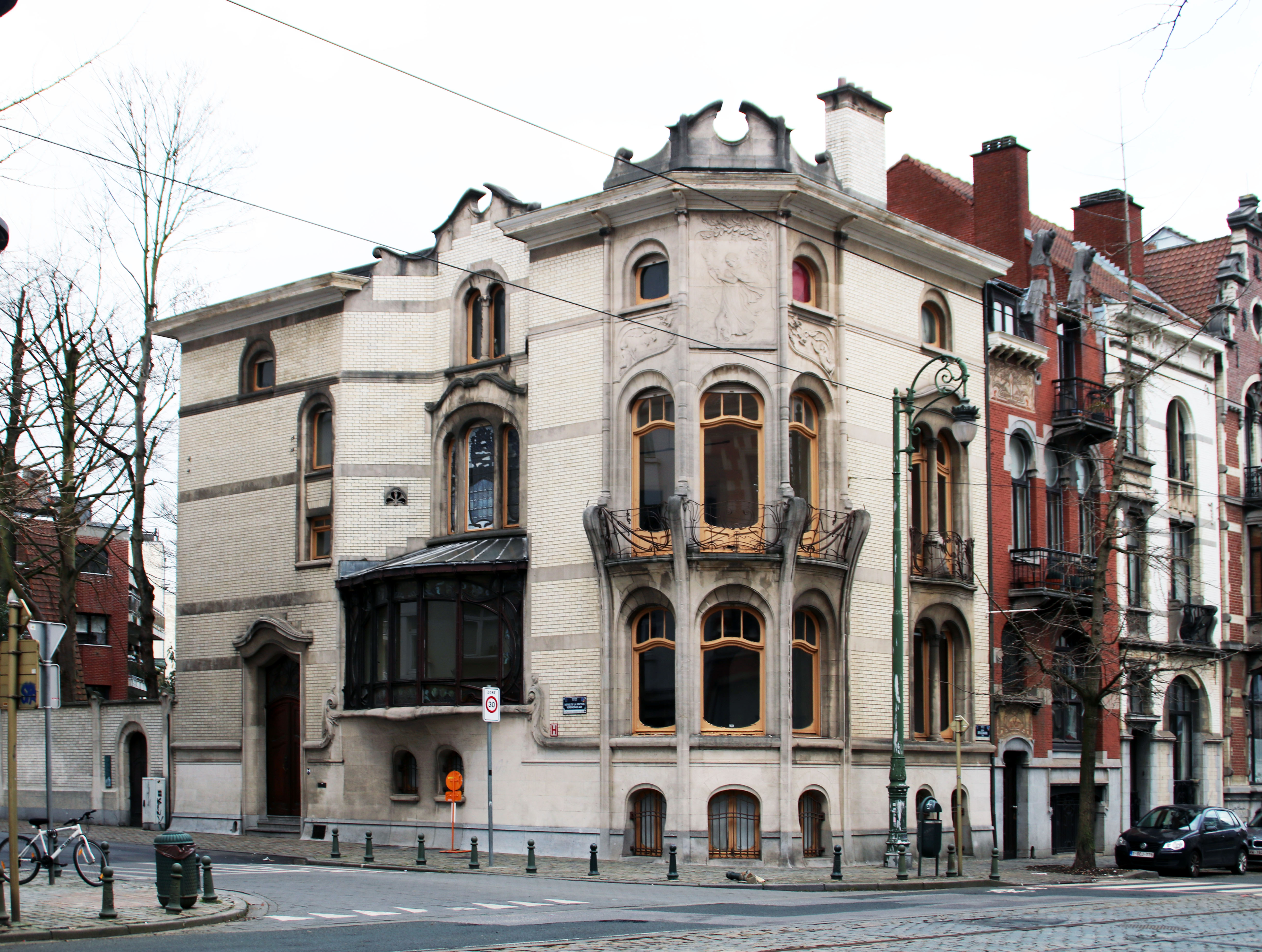 Hotel Hannon à Saint-Gilles